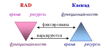 Разница между RAD и Каскадным методом